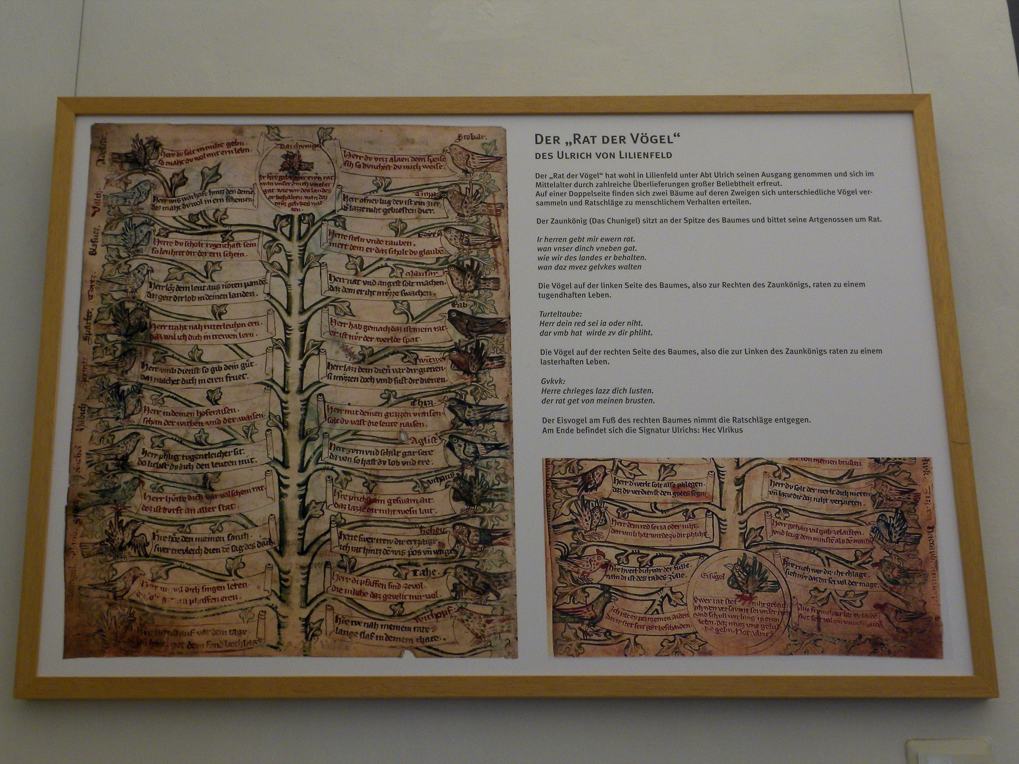 "Der Rat der Vögel" des Ulrich von Lilienfeld